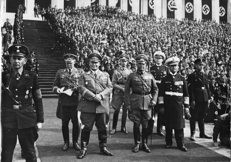 Nürnberg, Reichsparteitag, Tag der Wehrmacht Tag der Wehrmacht in Nürnberg. Bildbericht von der Wehrmachtsvorführung am Vormittag Die Befehlshaber der 3 Wehrmachtsteile von links nach rechts: Generaloberst [Hermann] Göring, Generaloberst Fhr. [Werner] v. Fritsch und Generaladmiral Dr.h.c. [Erich] Raeder [Nürnberg.- Reichsparteitag der NSDAP "Reichsparteitag der Ehre", 8.-14. September 1936] Abgebildete Personen: Göring, Hermann: Reichsmarschall, Oberbefehlshaber der Luftwaffe, Ministerpräsident von Preußen, Deutschland Fritsch, Werner von Freiherr: Generaloberst, Oberbefehlshaber des Heeres, Deutschland Raeder, Erich: Großadmiral, Oberbefehlshaber der Kriegsmarine, Deutschland (GND 118743511)